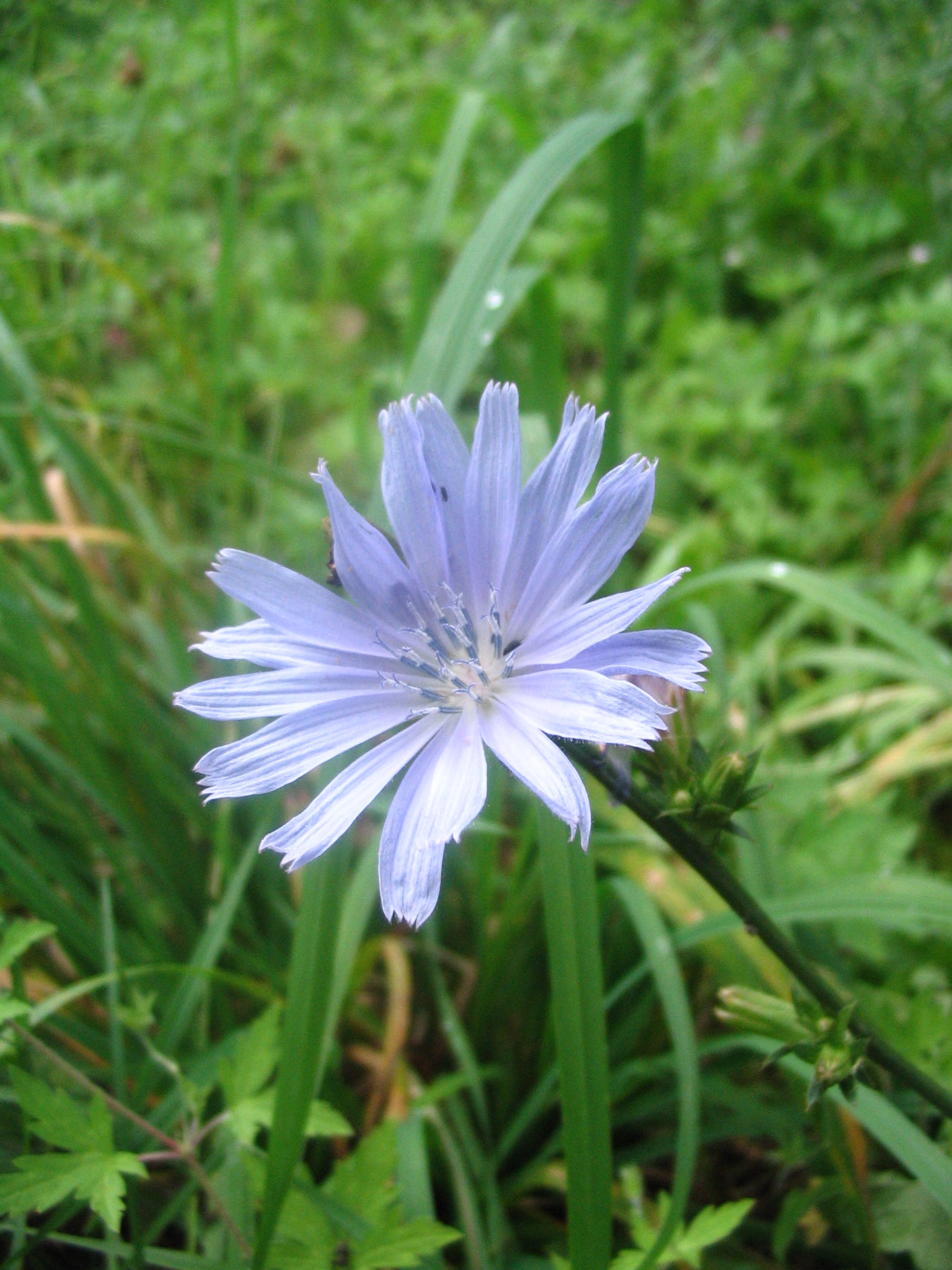 Цикорій в Україні, Хмельницька область.